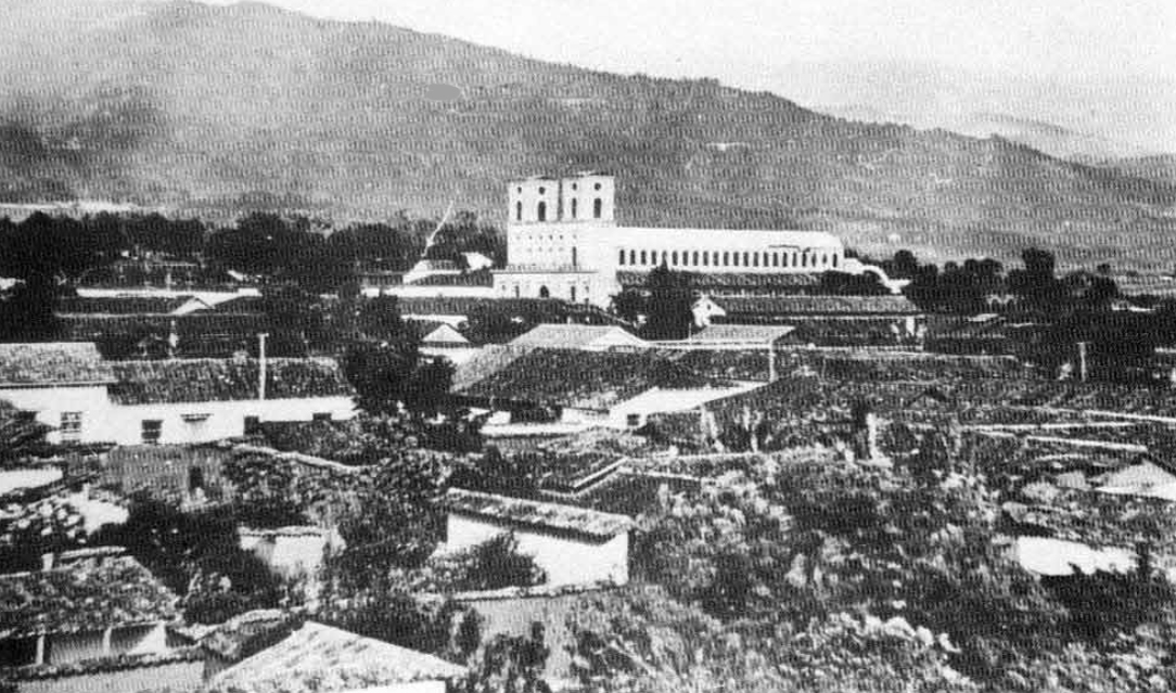 Catedral de la Sagrada Familia de Bucaramanga en los años 20 del Siglo XX